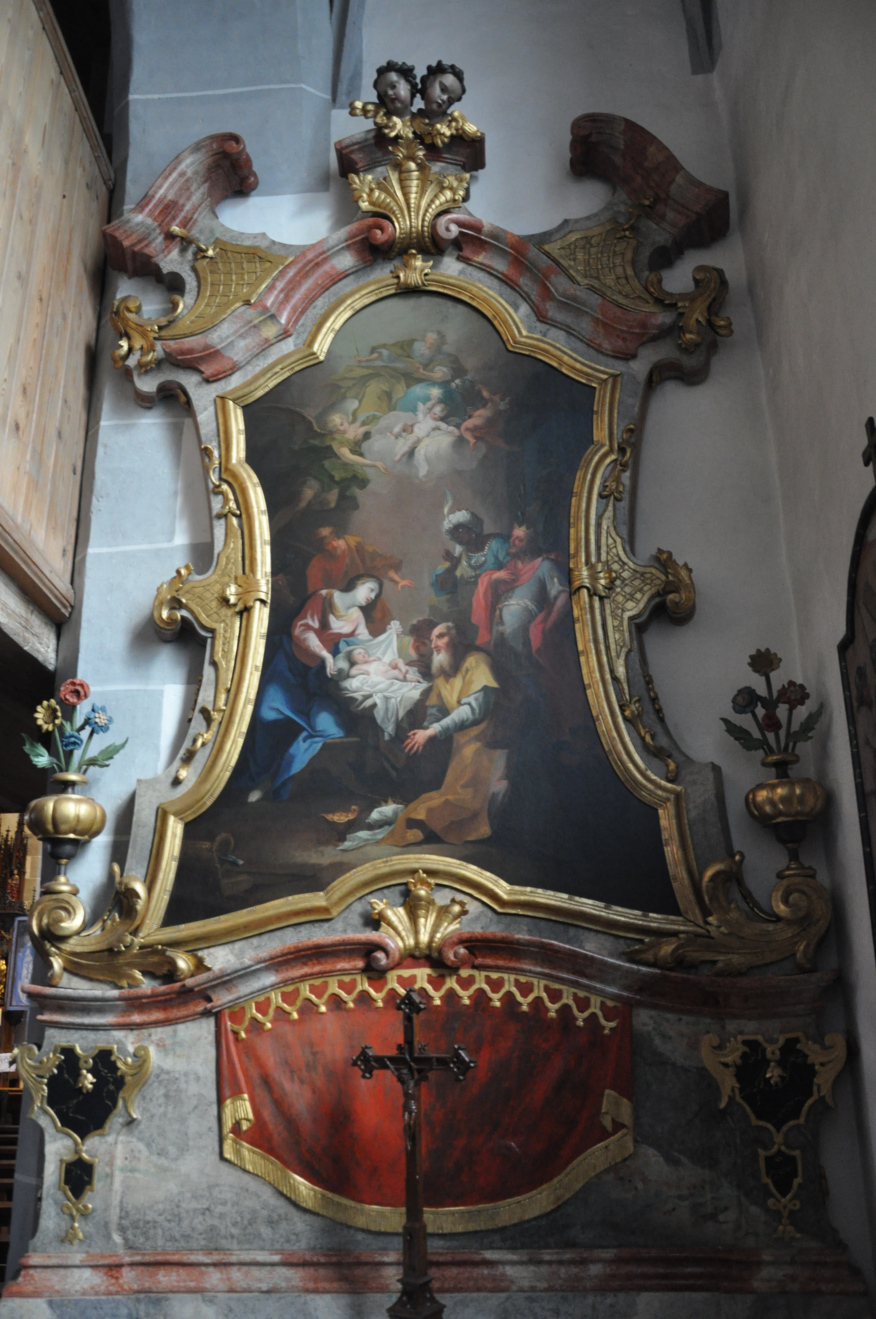 Oberstadion (Alb-Donau-Kreis), Pfarrkirche St. Martinus, Dreikönigsaltar mit Altarblatt "Anbetung der hl. drei Könige" von Johann Caspar Kohler (Saulgau)